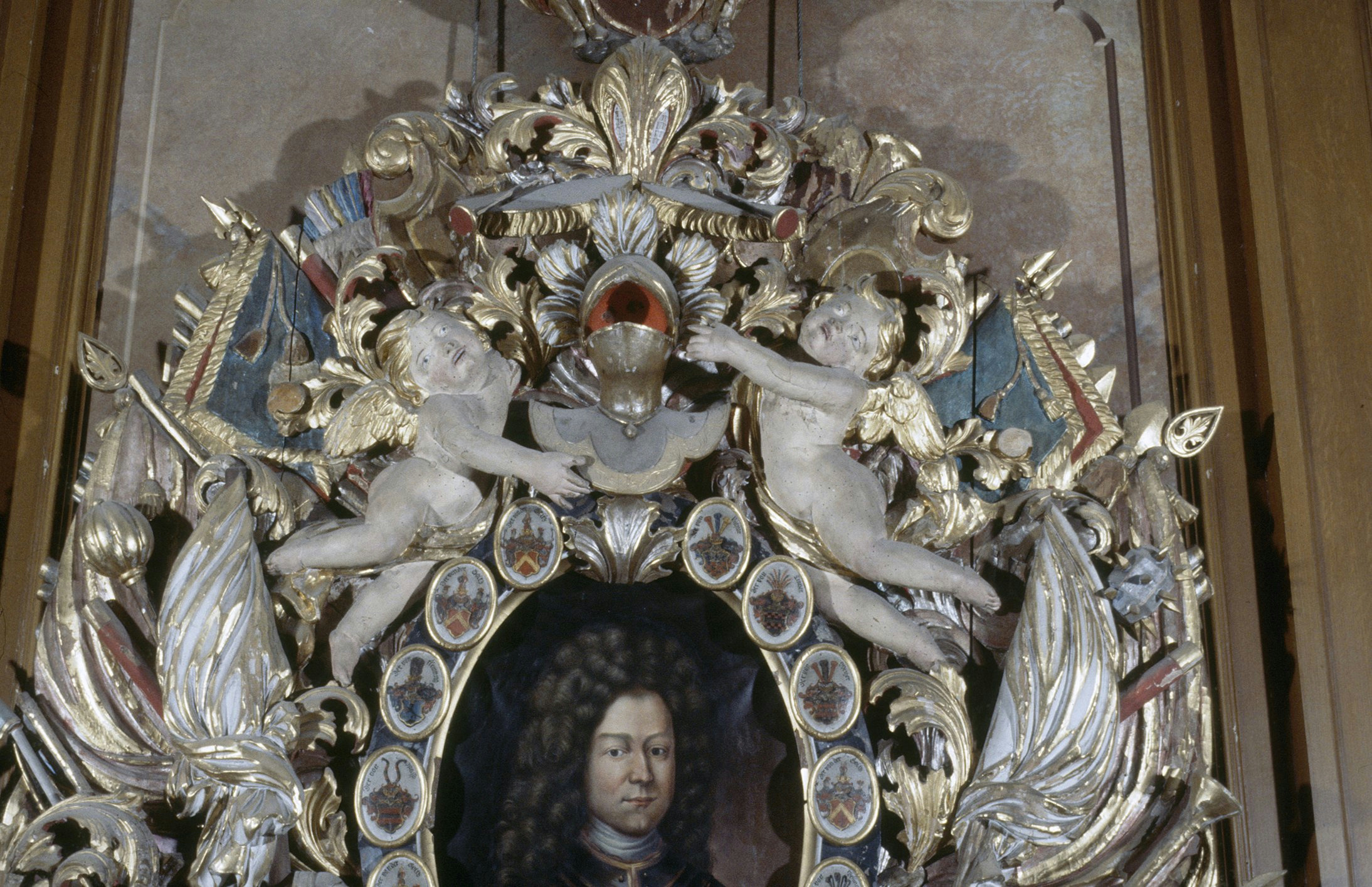 KASTEEL DE SLANGENBURG: INTERIEUR, PORTRET, DETAIL